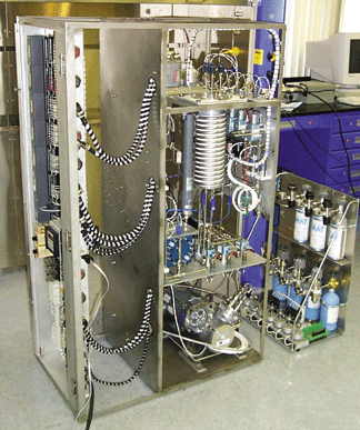 ISRU Reverse Water Gas Shift Testbed